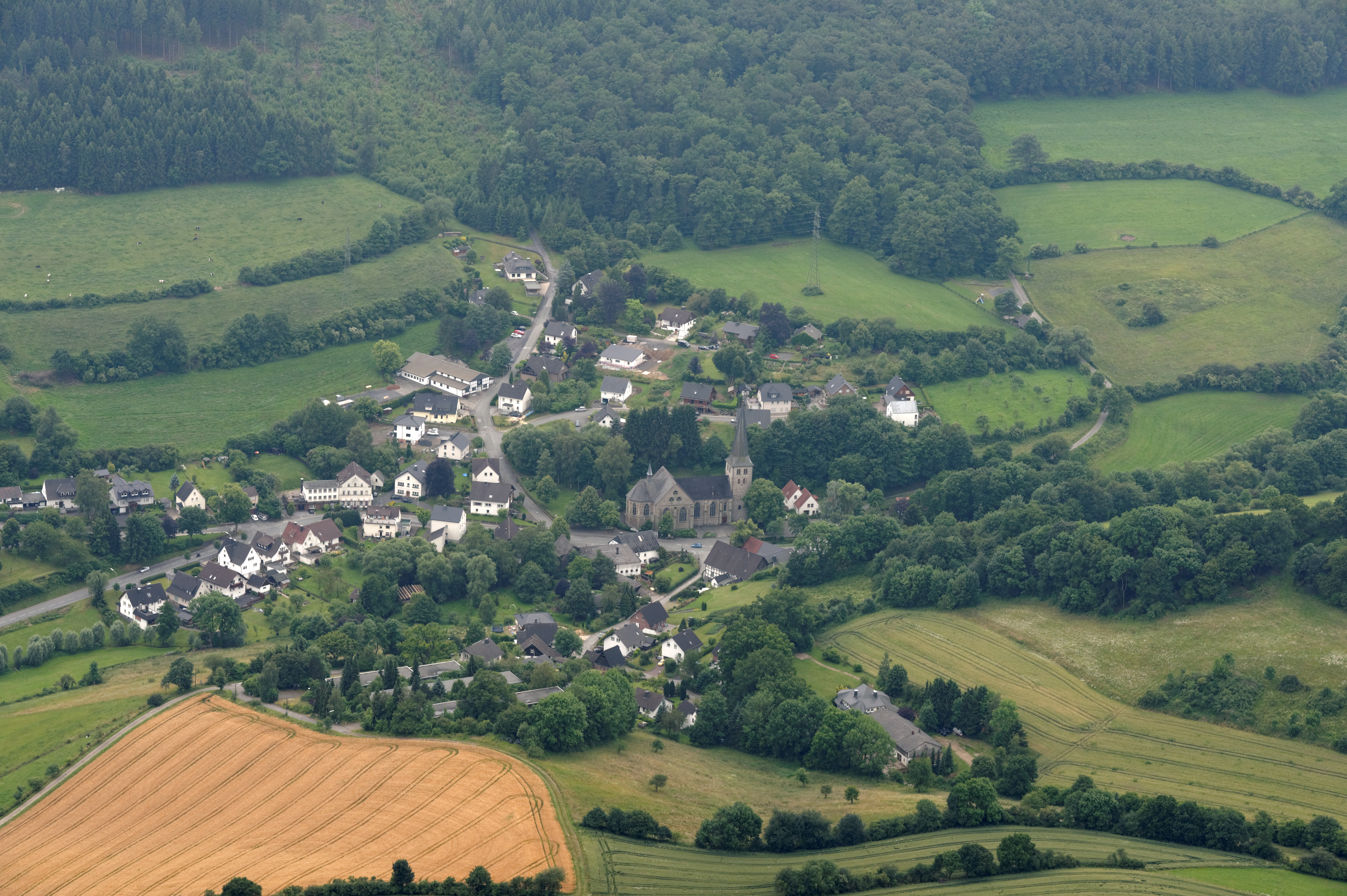 Fotoflug Sauerland Nord. Sundern (Sauerland)-Enkhausen mit Pfarrkirche St. Laurentius The making of this document was supported by the Community-Budget of Wikimedia Germany.